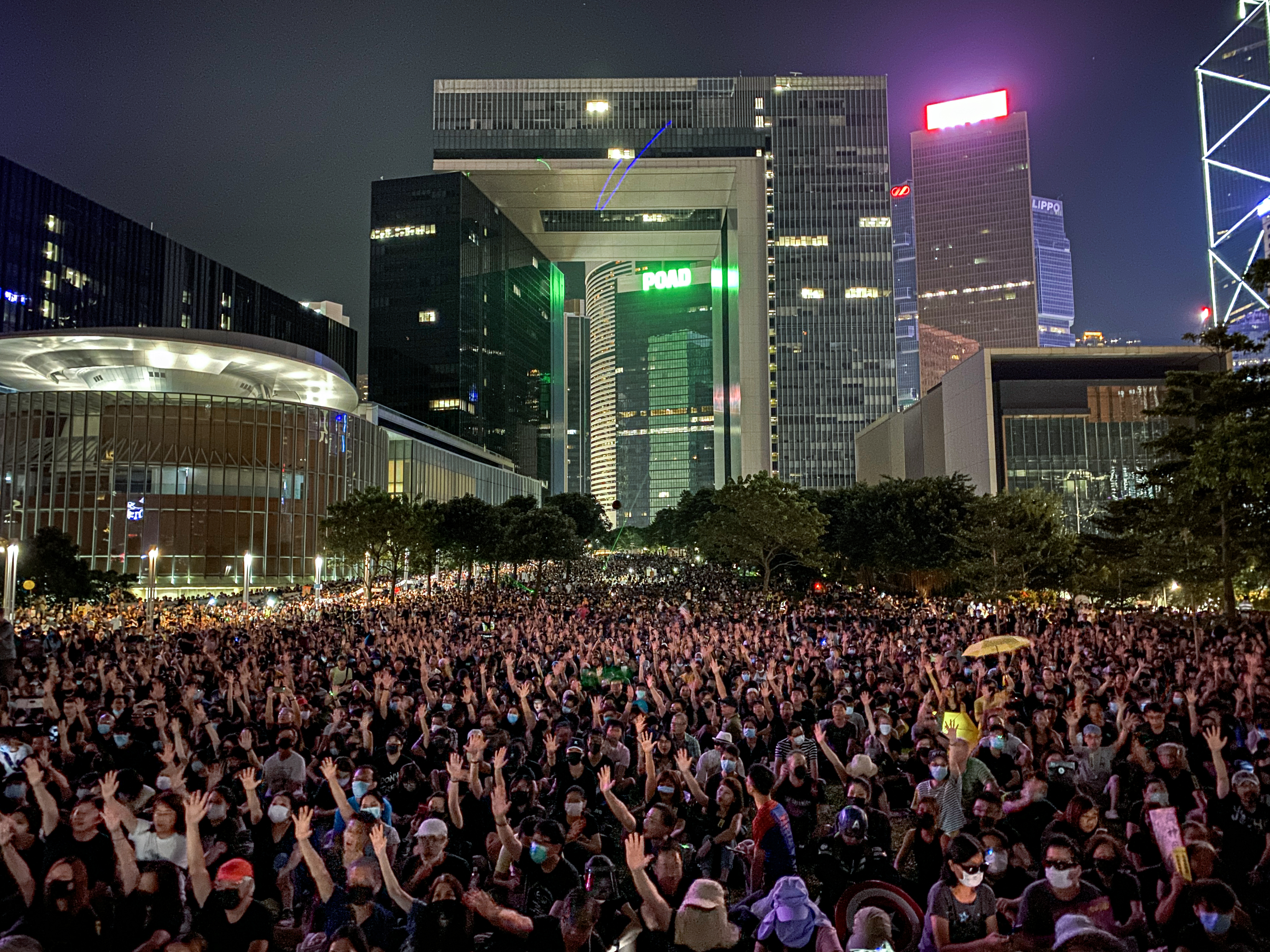 5th Anniversary Umbrella Movement – 傘運五周年, 28 September 2019 (Admiralty, Hong Kong)